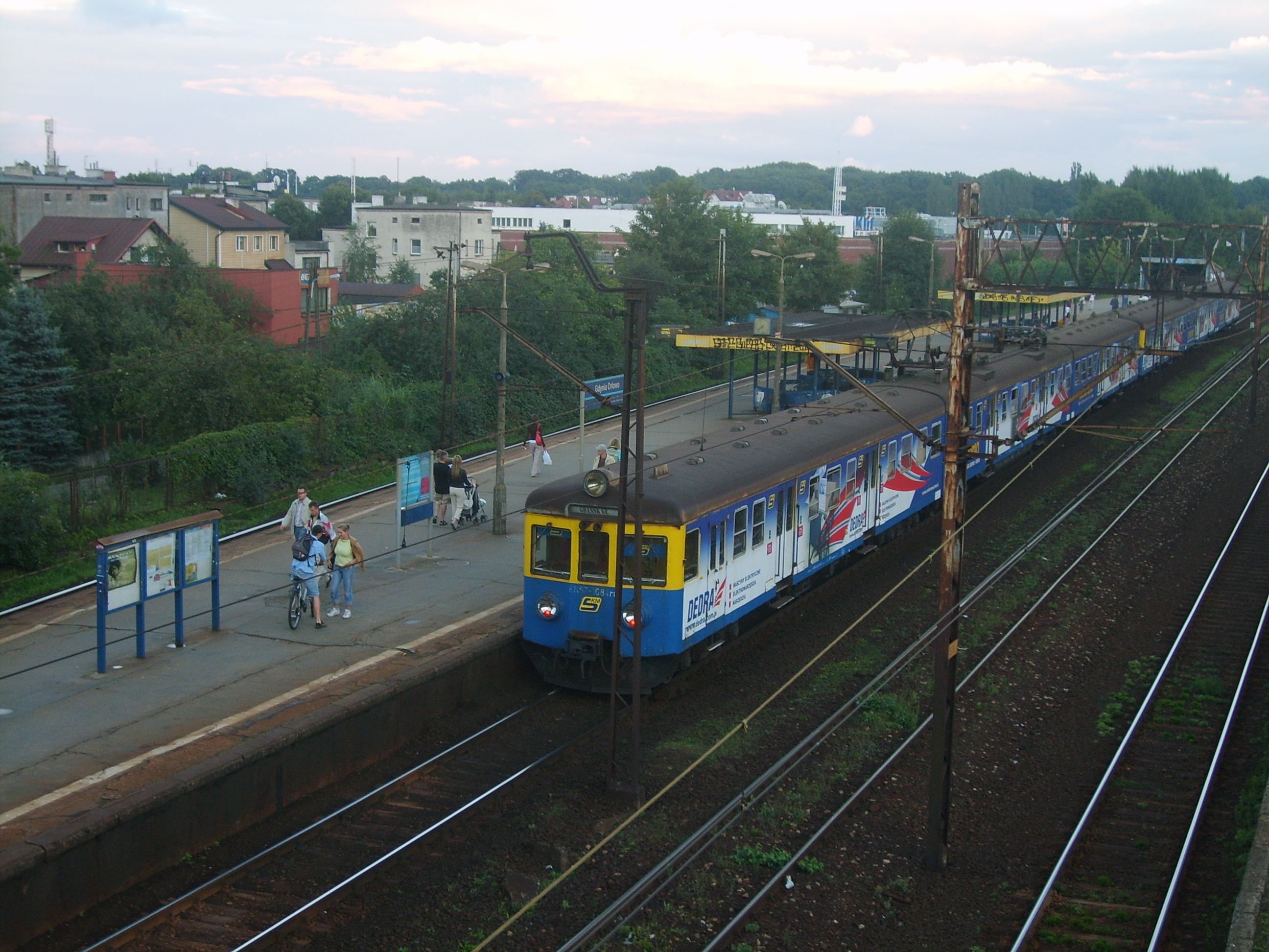 Stacja Gdynia Orłowo